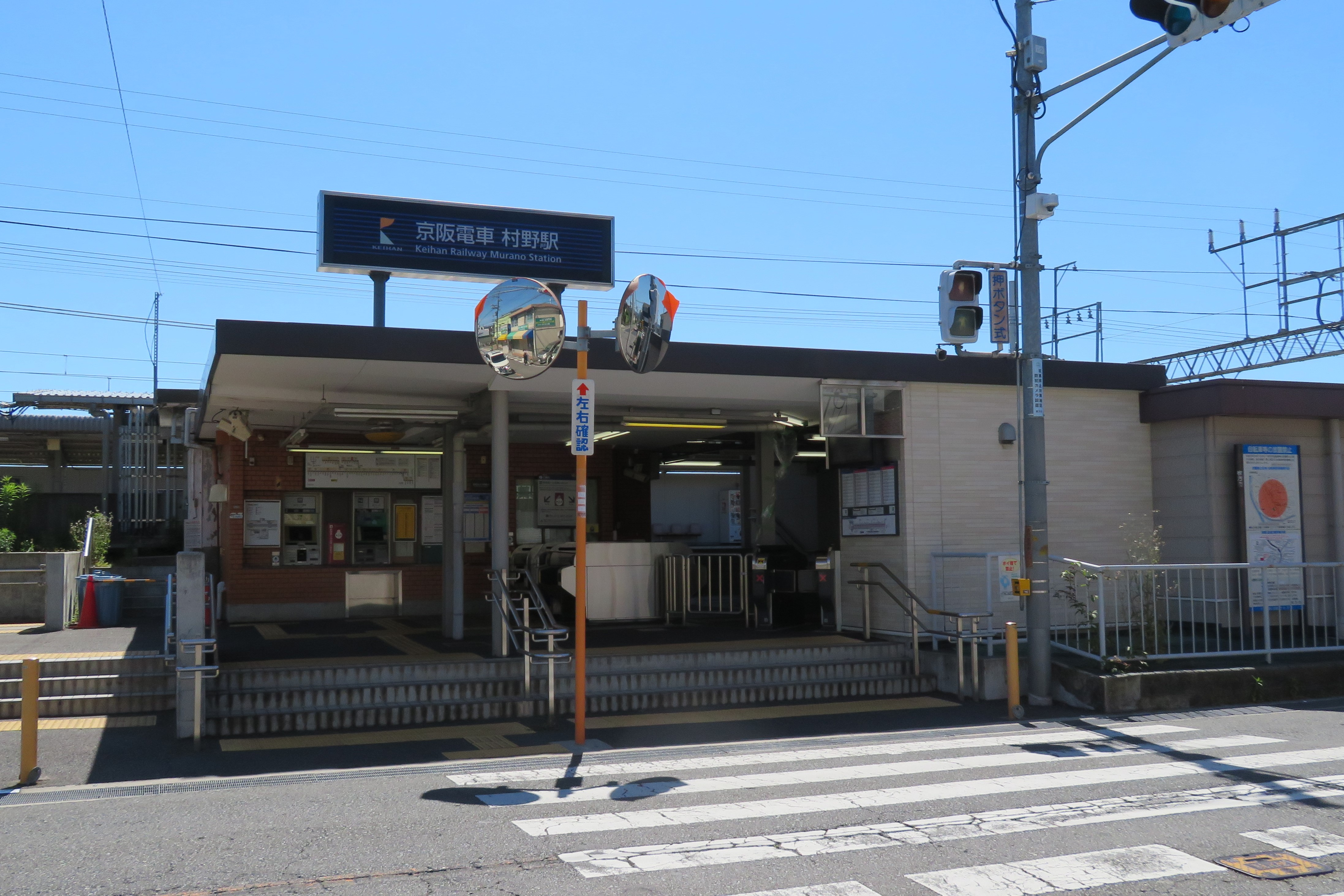 京阪電鉄村野駅